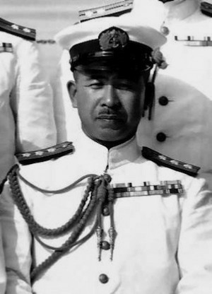 高田利種海軍少将